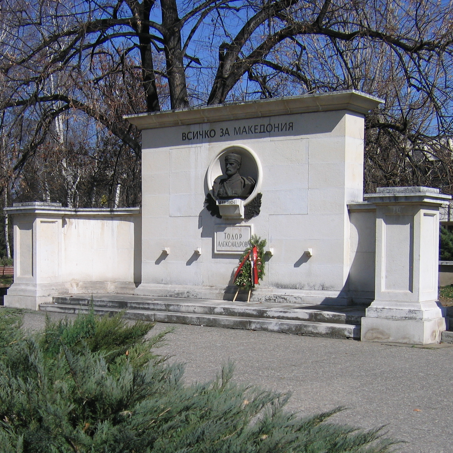 Паметник на Тодор Александров, Кюстендил, България.